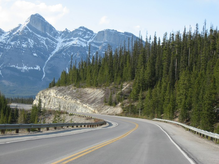 Айсфилд Парквей